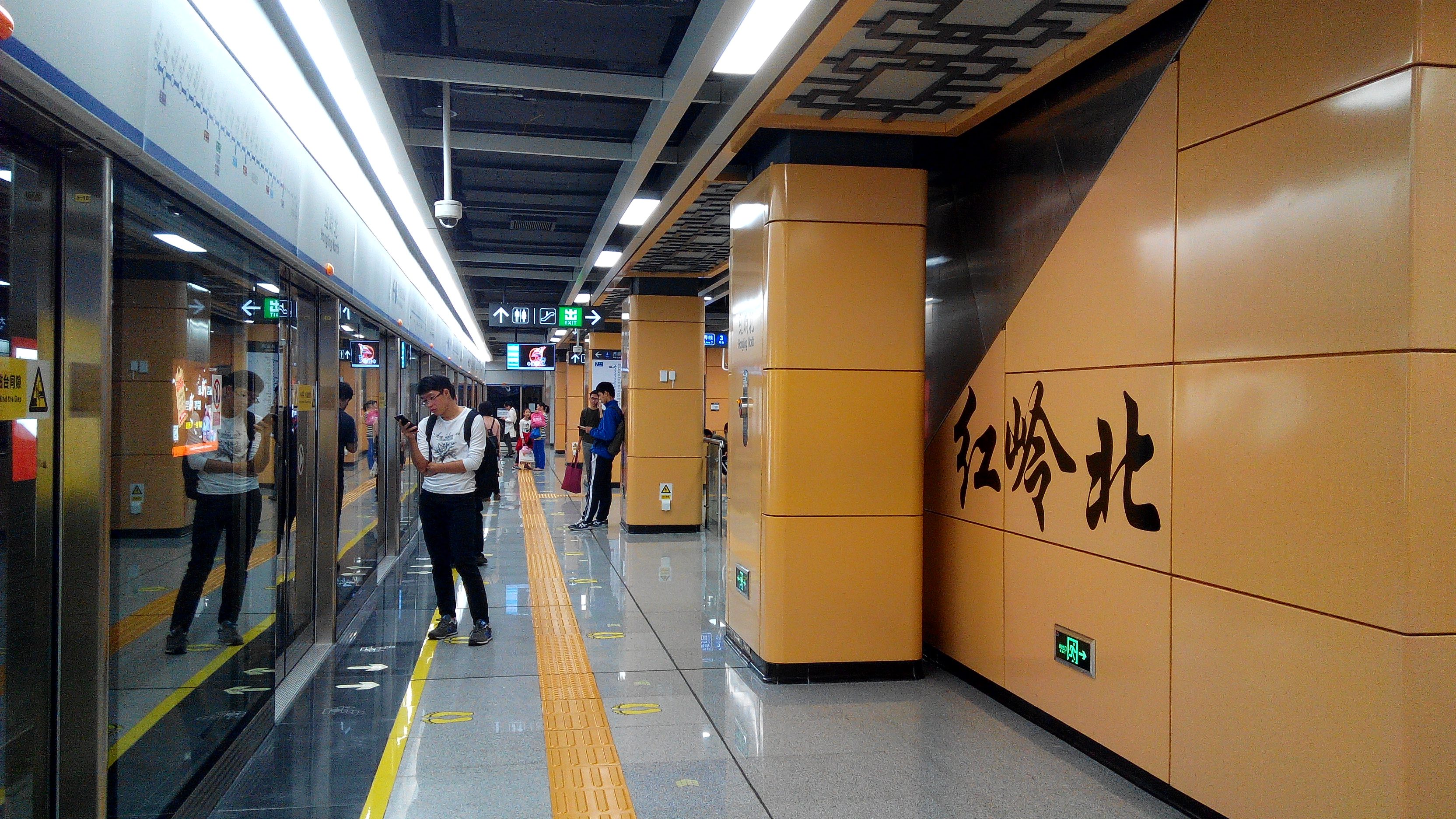 深圳地铁7号线 红岭南站3号站台